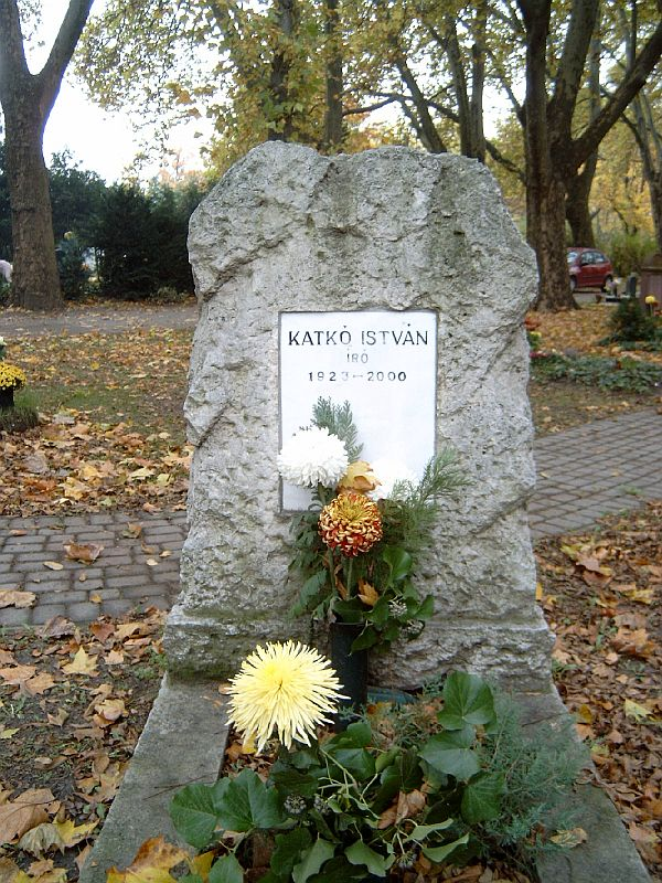 Katkó István (Jászjákóhalma, 1923. június 17. - Budapest, 2000. február 13.) író, újságíró sírja Budapesten. Kerepesi temető: 42/1-A-27.